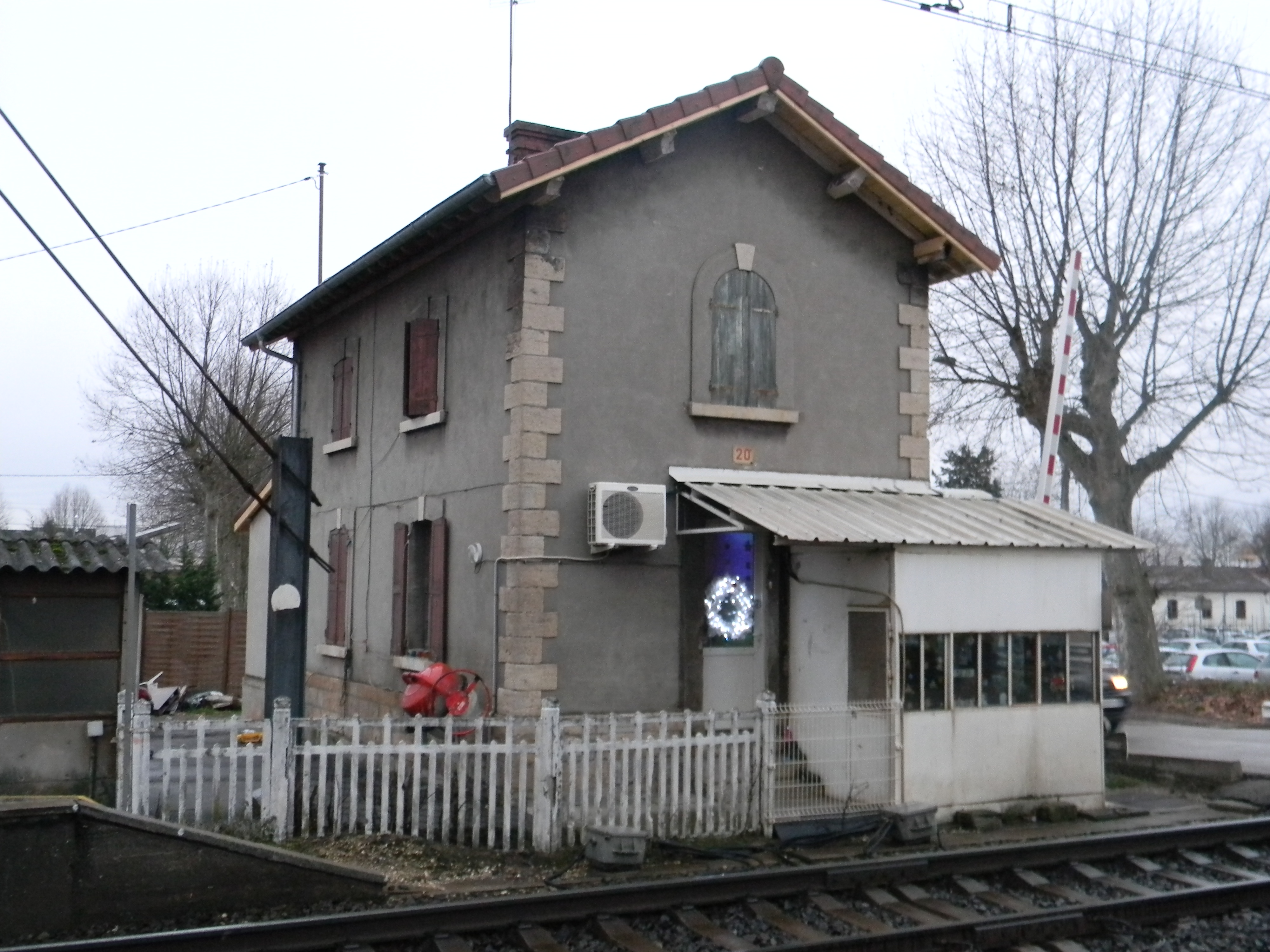 Ancienne maison du garde barrière de la gare de La Valbonne, dans l'Ain.